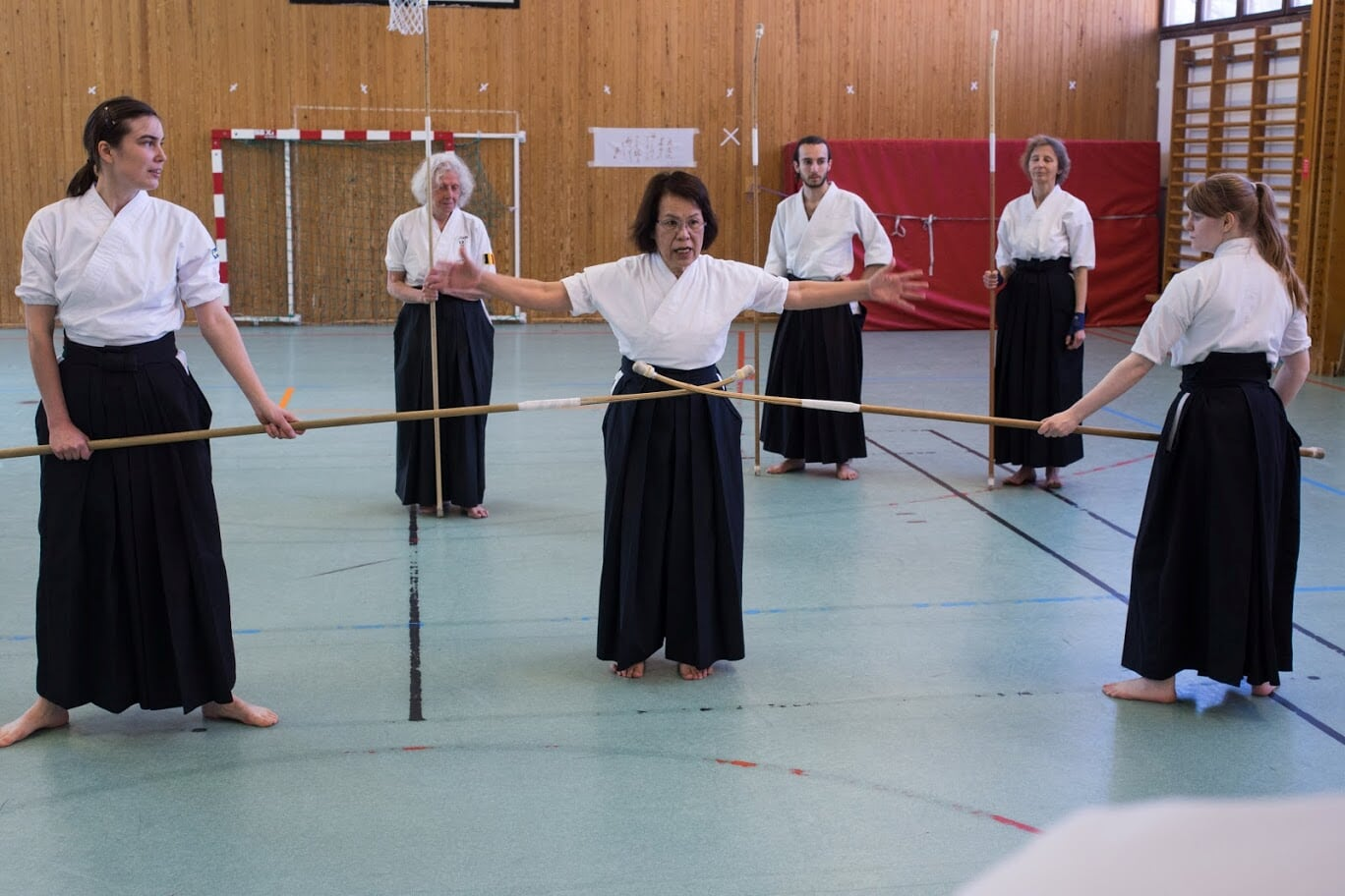 Naginata instruction